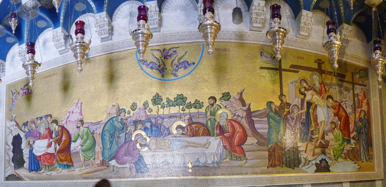 Panorama 5